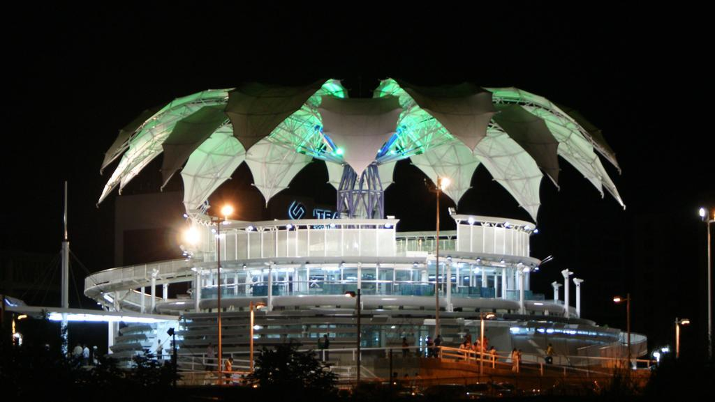 Flor de Venezuela, Barquisimeto, estado Lara, pabellón de Venezuela en Hannover.